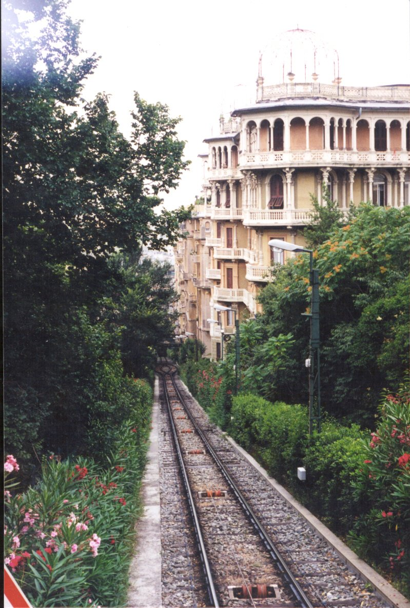 Funicolare Sant'Anna di Genova, binario nella parte a monte. Sullo sfondo il palazzo Odero, opera di Marco Aurelio Crotta